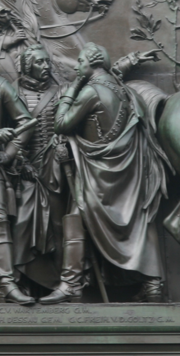 Reiterstandbild - Friedrich der Große - Südansicht ( Details ) Mitte - Standfiguren - Rechts Person - Links ( 5 ) --- H.C. V. WARTEMBERG G.M. ----- Person - Person ( 6 ) --- G.C. FREIH. V. D. GOLTZ G.M. ----- Quelle : Fotos - Heinzi Berlin - Unter den Linden ( Mittelpromenade ) Baudenkmal ( LDA ) Landesdenkmalamt - Berlin Dok Nr. 09060118 LDA Info wiki Reiterstandbild Friedrichs des Großen